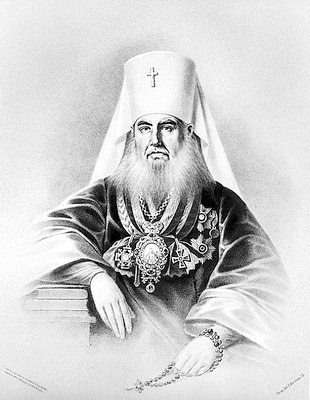 Митрополит Арсений (до пострижения Фёдор Павлович Москвин; 1795 — 1876) — епископ Русской православной церкви, митрополит Киевский и Галицкий.